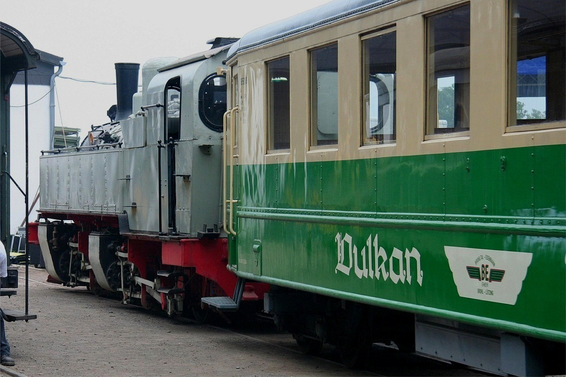 Mallet-Lokomotoive 11sm der Brohltalbahn, Baujahr 1906, vor der Restaurierung